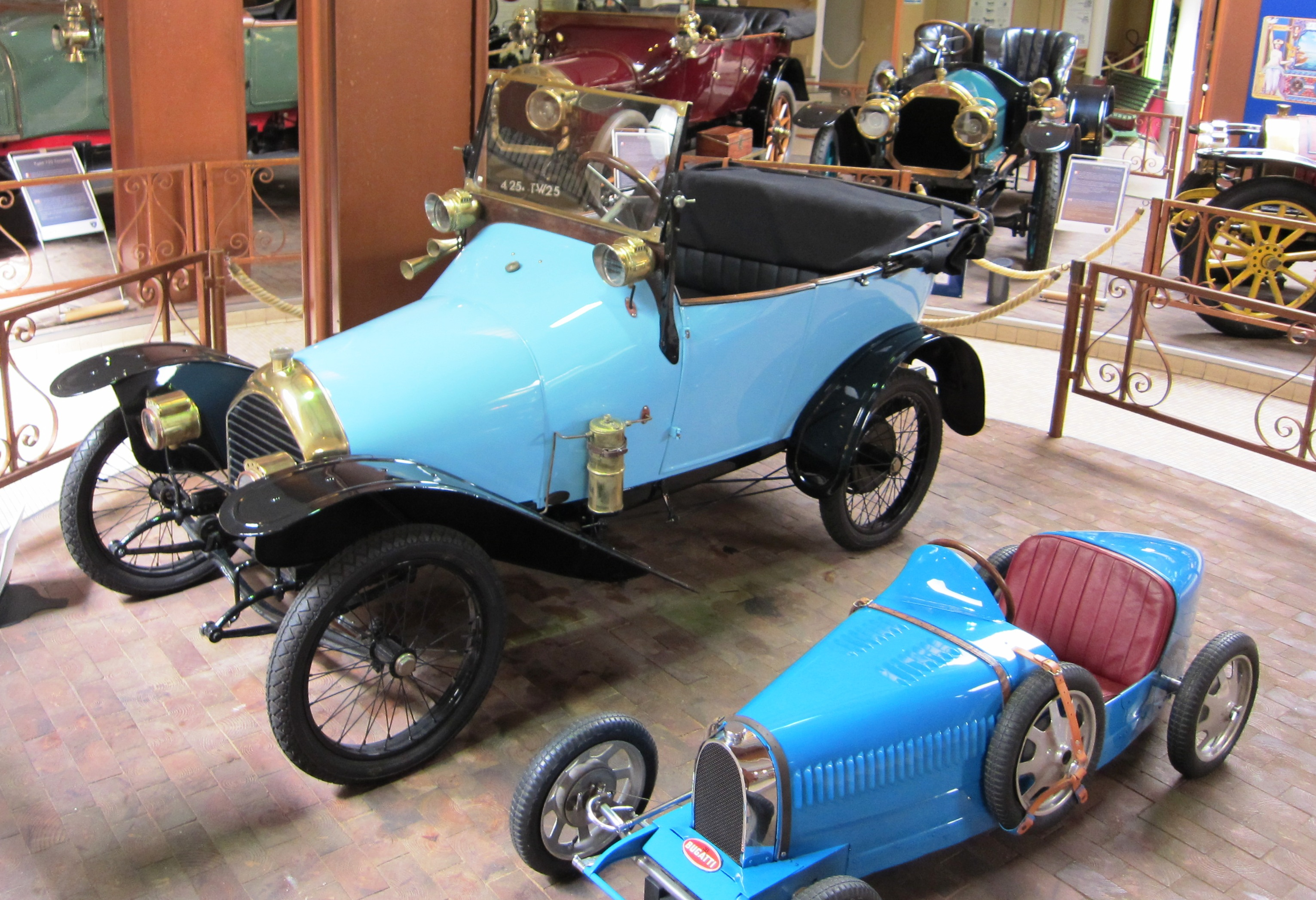 Bébé Peugeot (Design Bugatti) Selon l'étiquette du Musée Peugeot: Bébé Peugeot : Bugatti, qui avait conçu cette petite voiture, proposa à Peugeot de lui en céder sa licence de fabrication. Les usines de Beaulieu commencent sa fabrication en 1913 et son succès fut tel qu’elle fut la première Peugeot à atteindre les trois mille exemplaires fabriqués. La voiturette « Bébé » de 1913 était commercialisée en mettant en avant son économie et en la comparant au cheval. Par exemple la brochure concluait, dans le cas d’un médecin, que pour couvrir ses 40 kms quotidiens, elle remplaçait 2 chevaux et n’en coûtait qu’un.